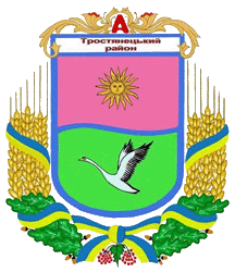 Герб Тростянецького району